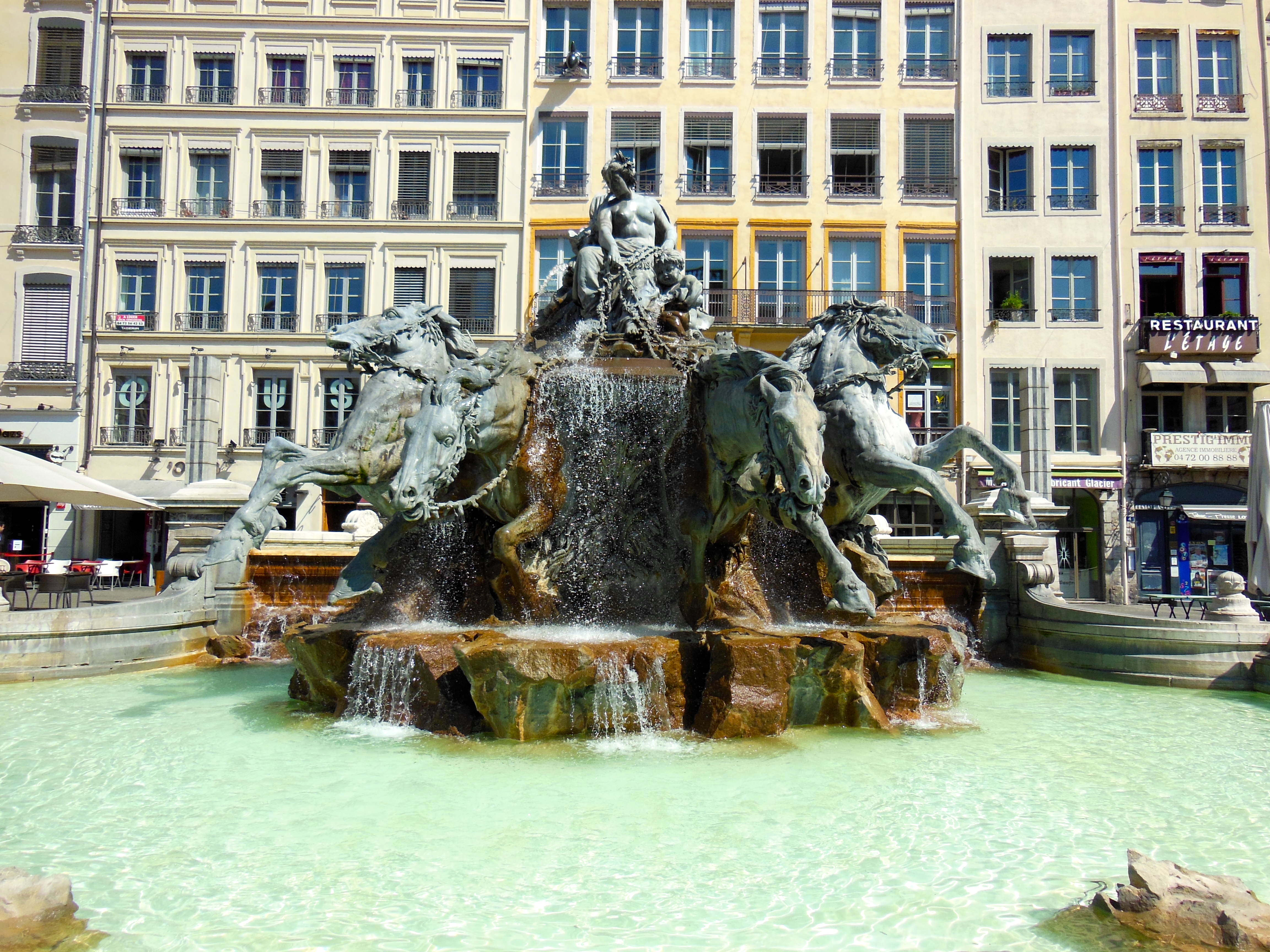 Fontaine Bartholdi - Place des Terreaux - Lyon